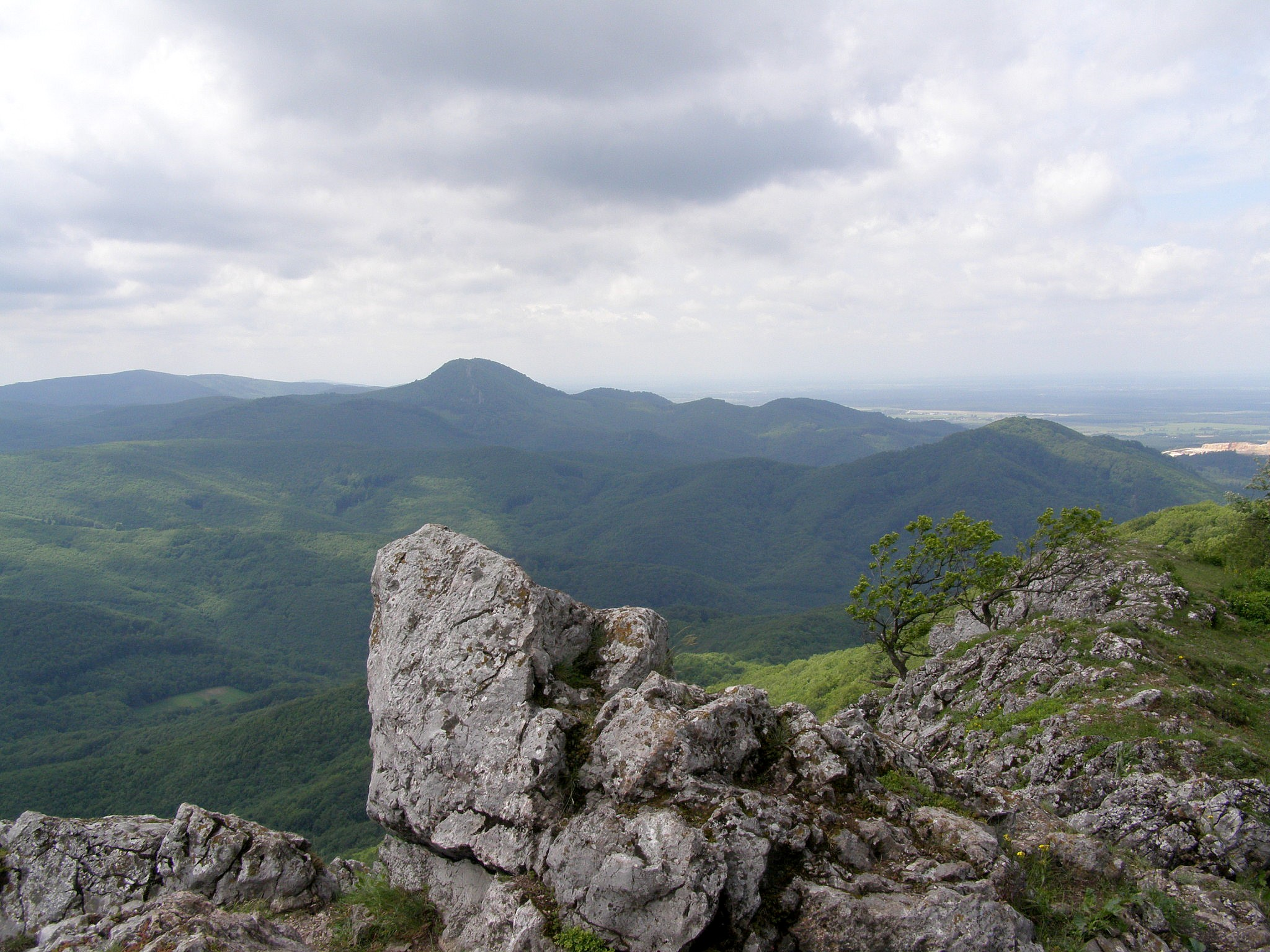 Pohľady z vrcholu Vápennej